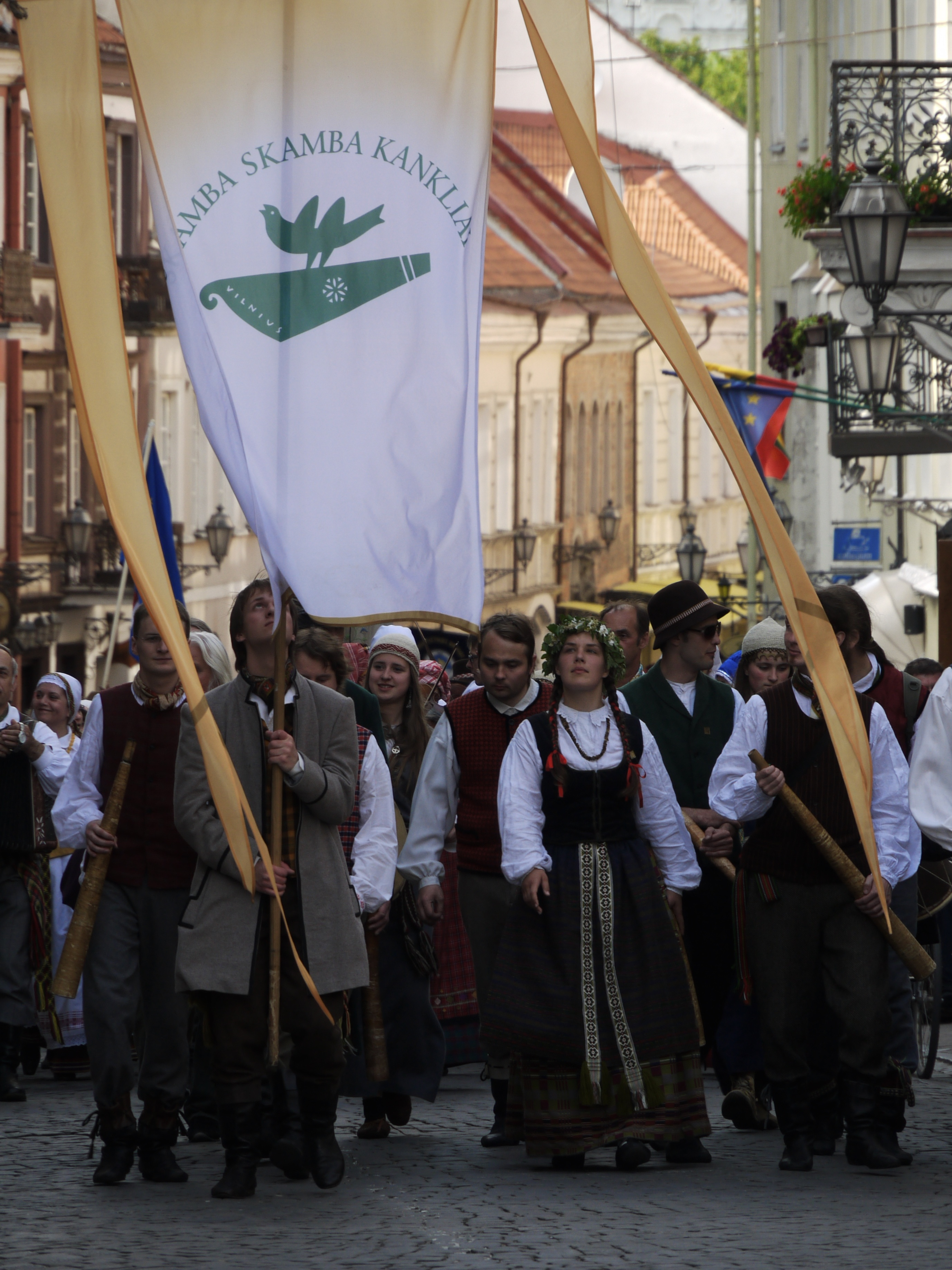 Vilnius ethnic festival parade.